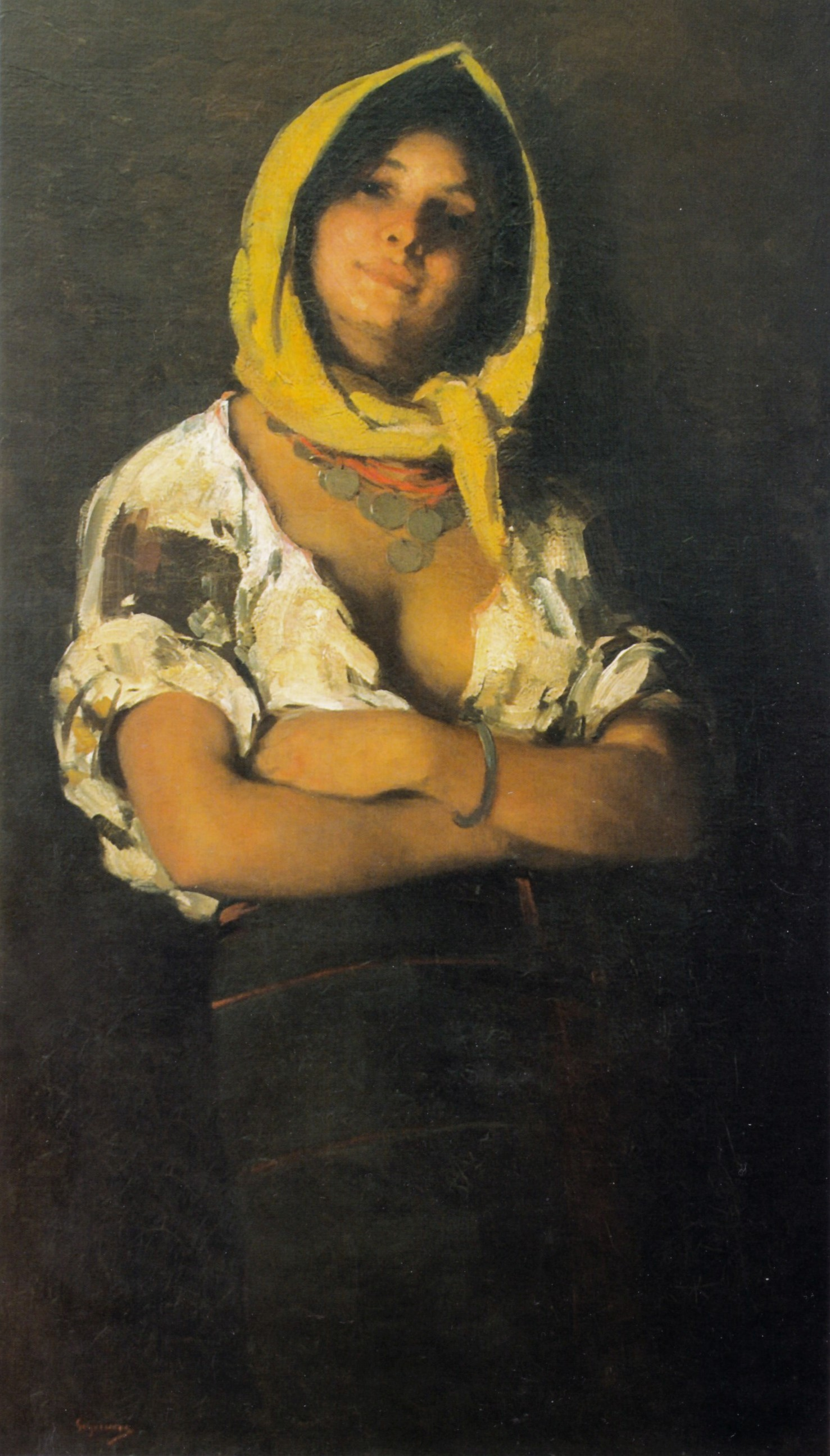 Ursăreasa din Bolduri cunoscută și ca Țigancă din Boldu, ulei pe pânză, semnat stânga jos cu roșu: Grigorescu - Muzeul de Artă din Iași